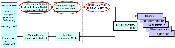 Rol_mentale_en_digitale_modellen_bij_gissen.PNG is eigen gemaakte media, een variant op 'Rol_mentale_modellen_bij_visualisatie.PNG'; de bij een GIS gebruikte onderdelen zijn rood weergegeven; GIS is dus niet alleen een kaartjesmachine, maar er is toegang tot het visuele en digitale model. Hierdoor kunnen analyses en andere uitdrukkingsvormen worden gemaakt.